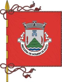 Bandeira de Moncim de Basto